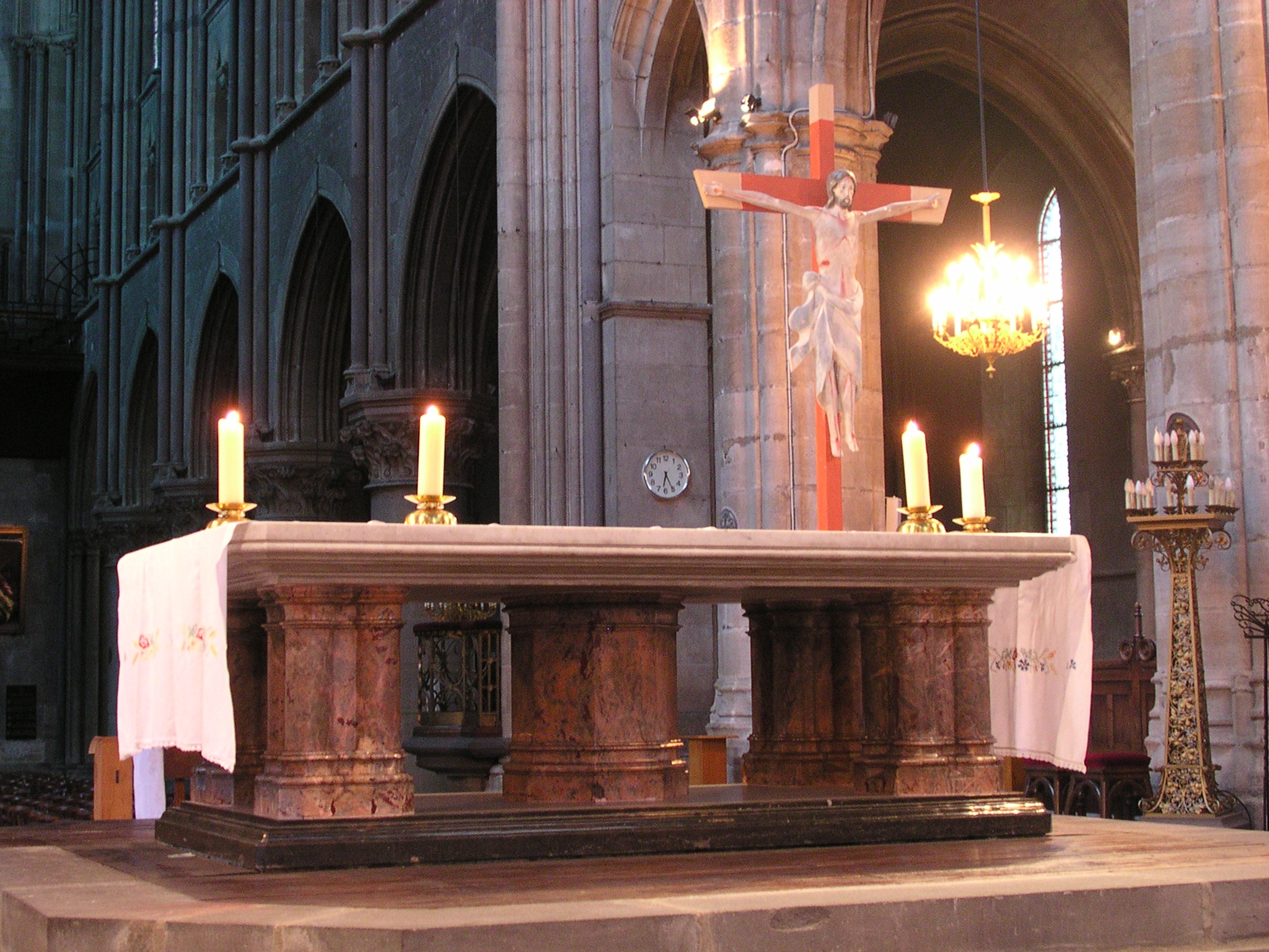 Maître-autel de la cathédrale de Moulins (Allier-France)